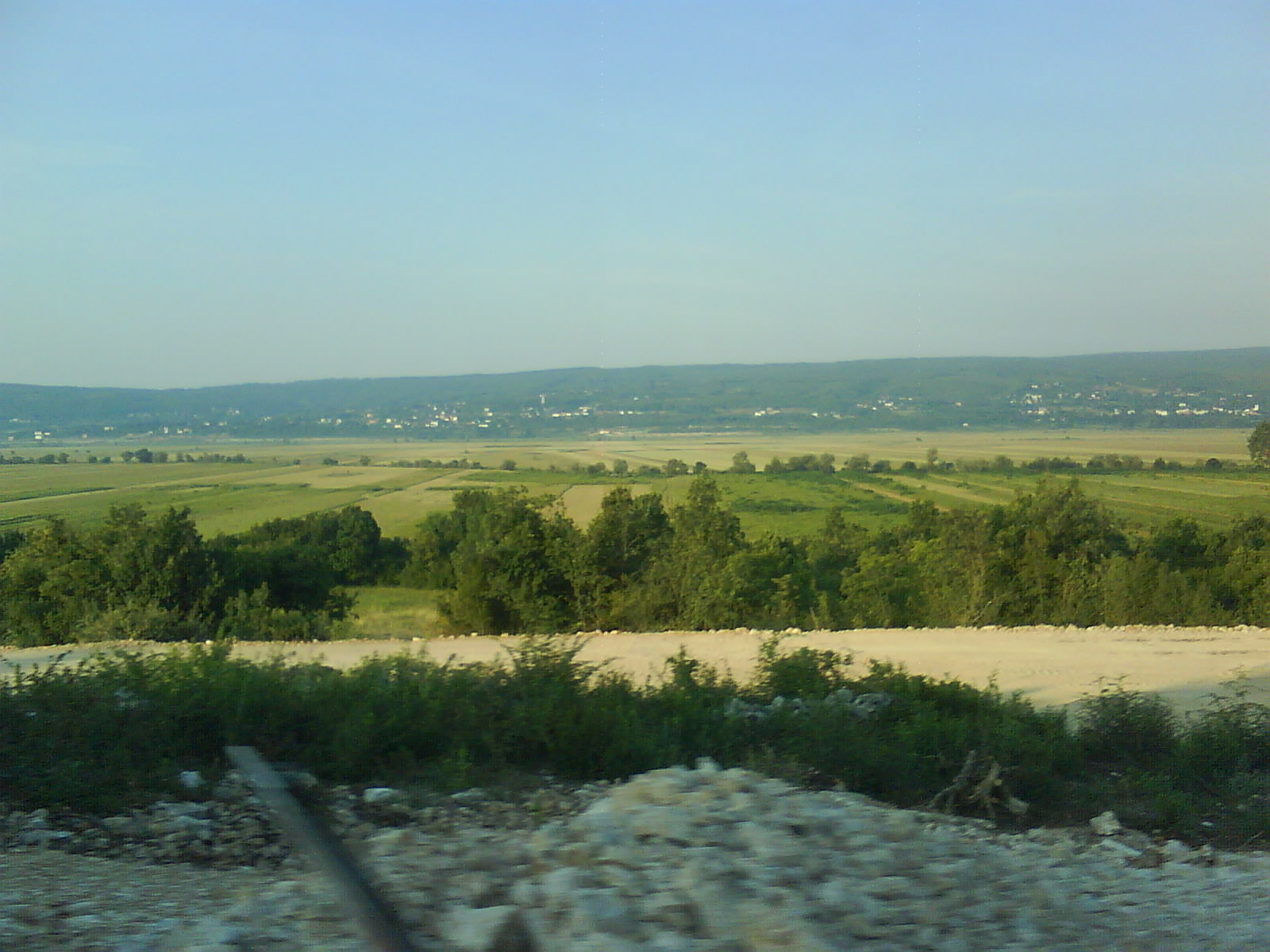 Mostarsko blato